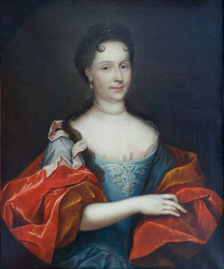 Тереса Замойська з Потоцьких